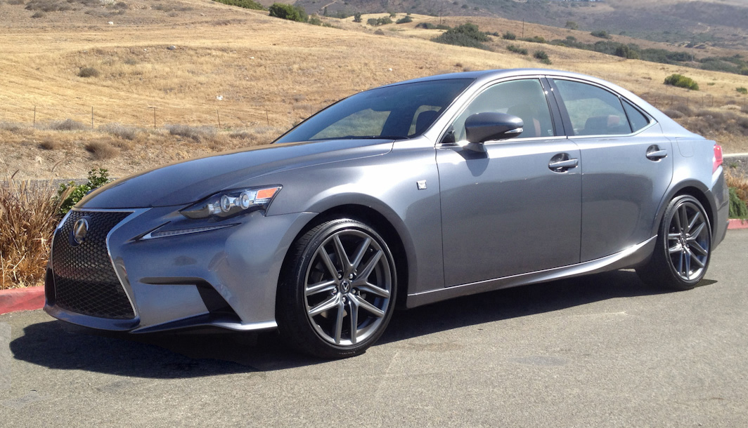 Mannen Kishi In LA